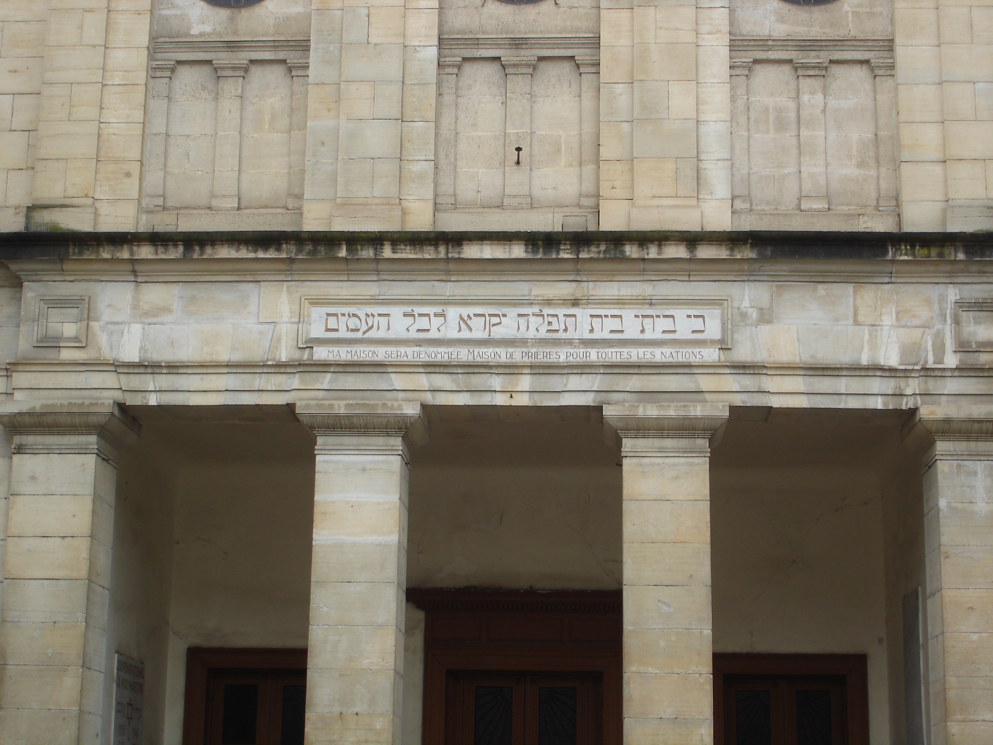 Synagogue of Bayonne (France)- Inscription in Hebrew and French on the pediment : verset biblique Isaïe 56,7 : "Car ma maison sera appelée maison de prière pour tous les peuples." On trouve le même verset sur la synagogue de Toul.